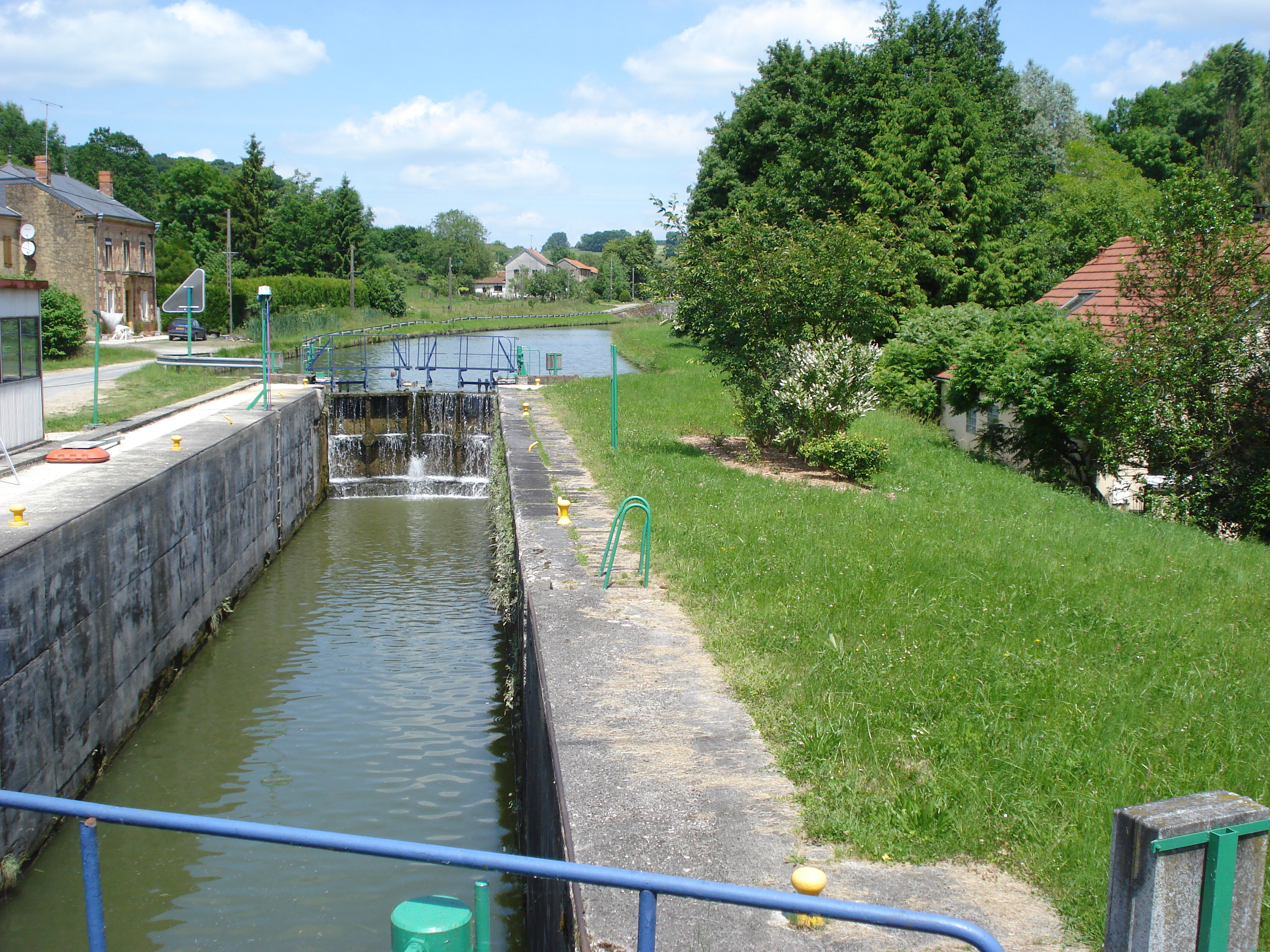 Montgon (Ardennes, Fr) in the "Vallée des écluses": Canal des Ardennes